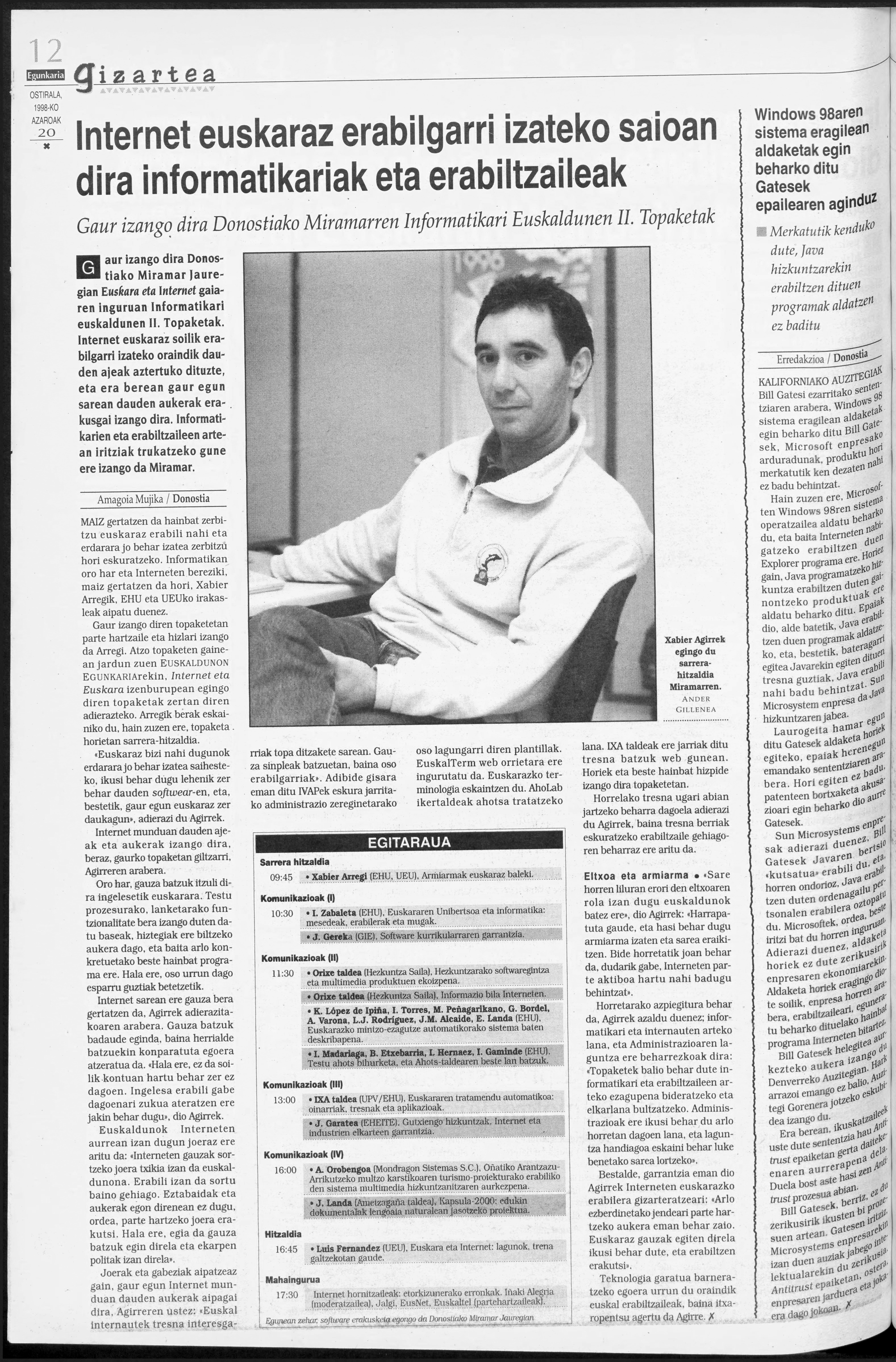 1998ko Informatikari euskaldunen II. bilkuraz elkarrizketa Xabier Arregi Iparragirre informatikariarekin Euskaldunon Egunkarian